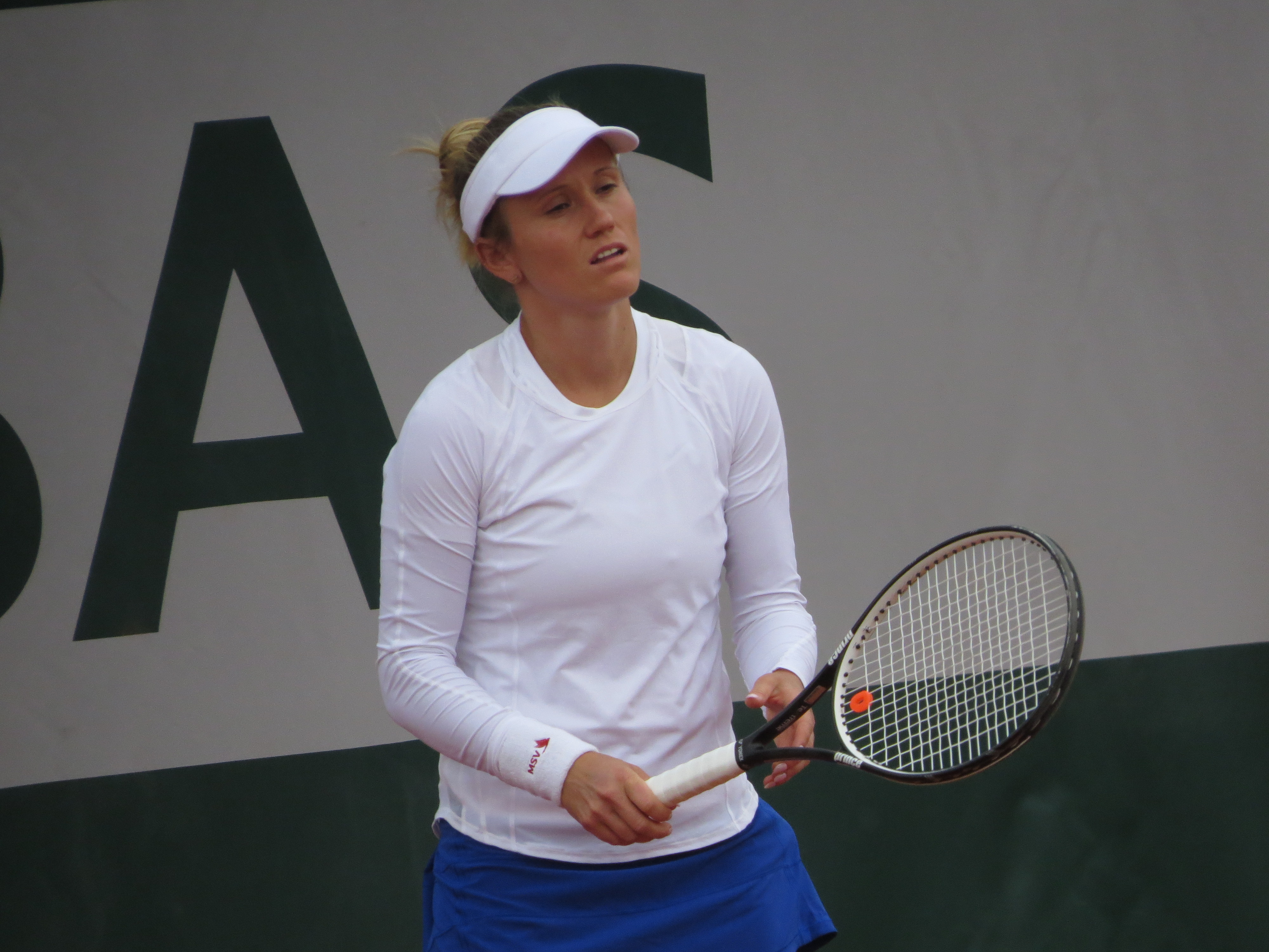 Katarzyna Kawa lors de son premier tour des qualifications.